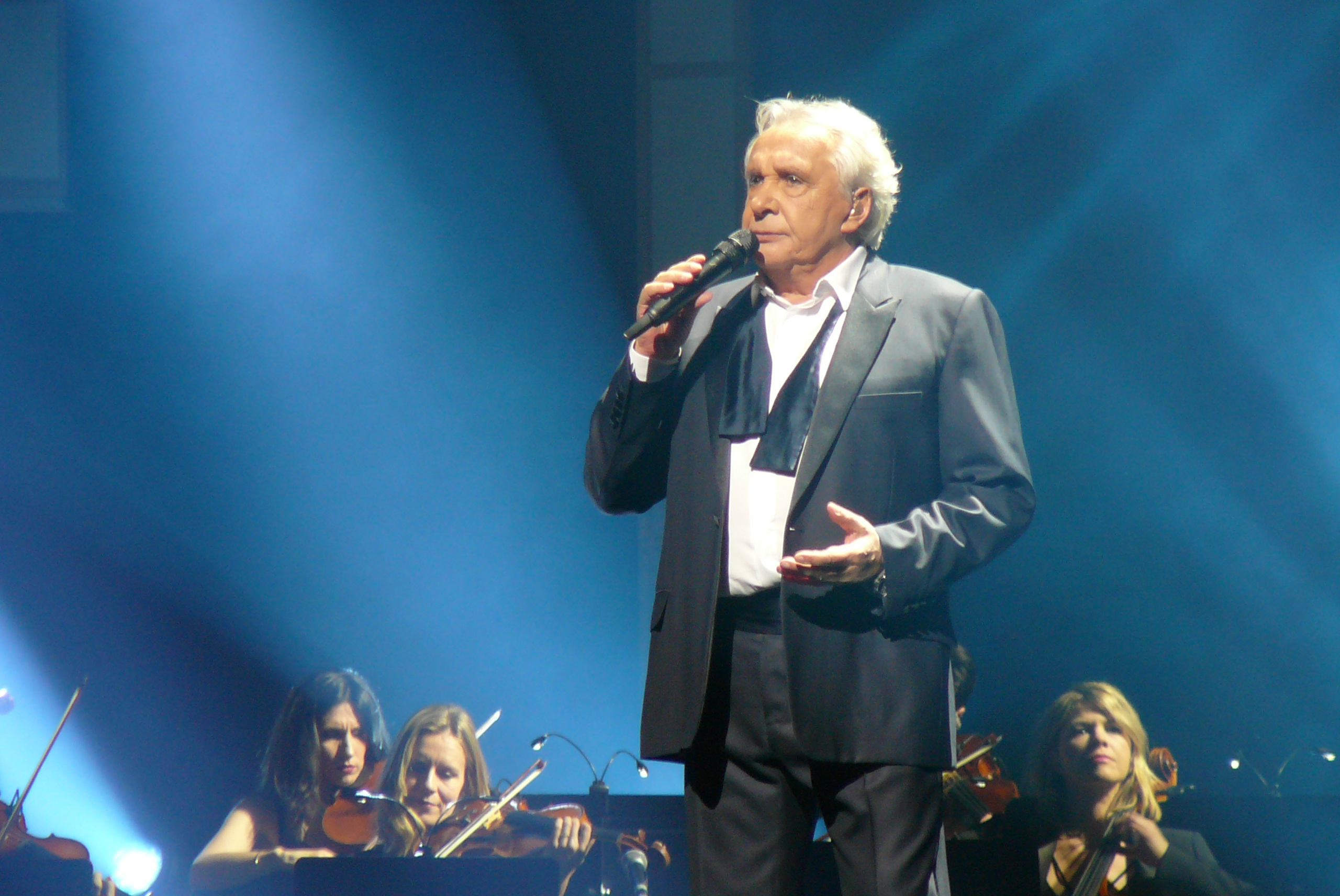 Le chanteur Michel Sardou sur la scène de la Seine Musicale à Boulogne-Billancourt, lors de sa tournée "La Dernière Danse", en décembre 2017